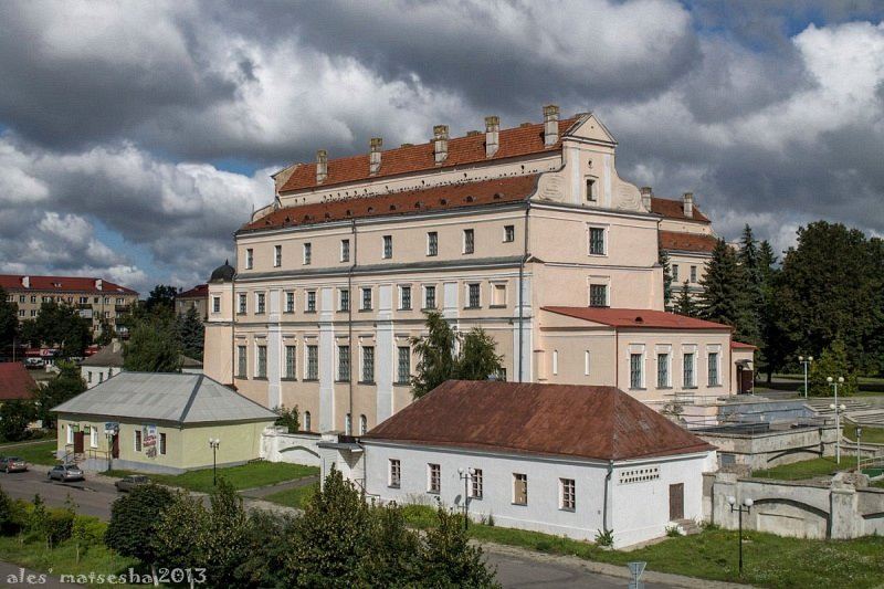 Цэнтр Пінска